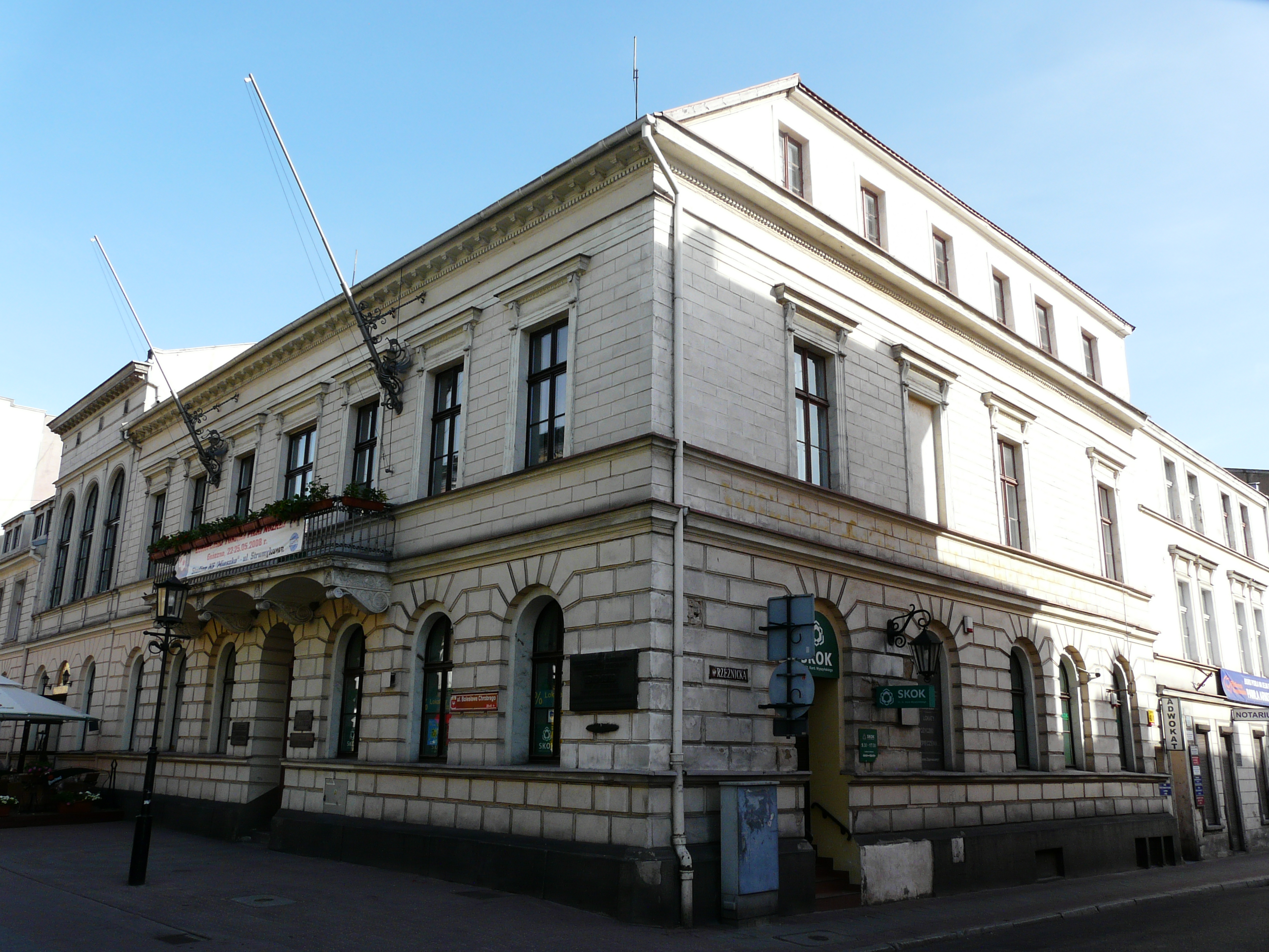 Gniezno, Poland